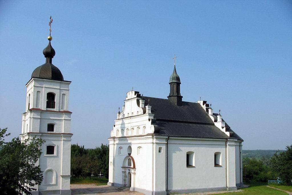 Іллінська церква у Суботові: Іллінська церква у Суботові - родова усипальниця Хмельницьких